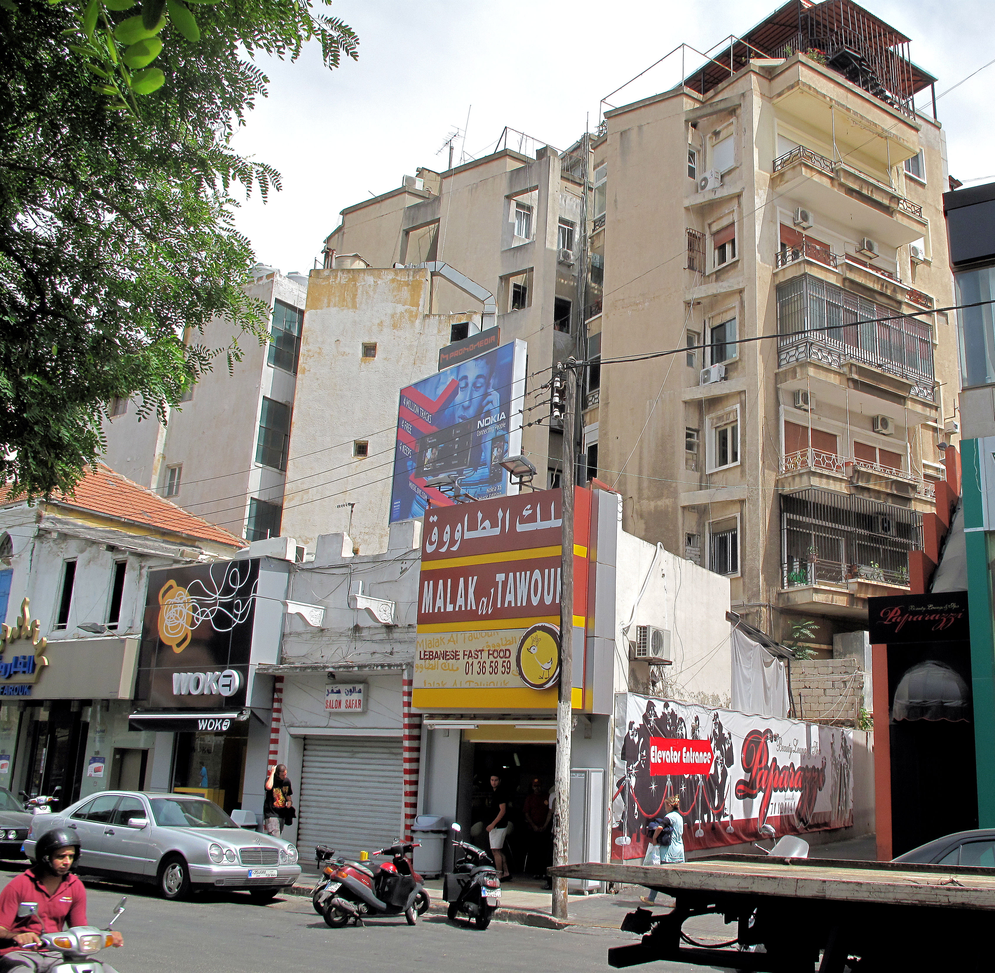 Bliss St.